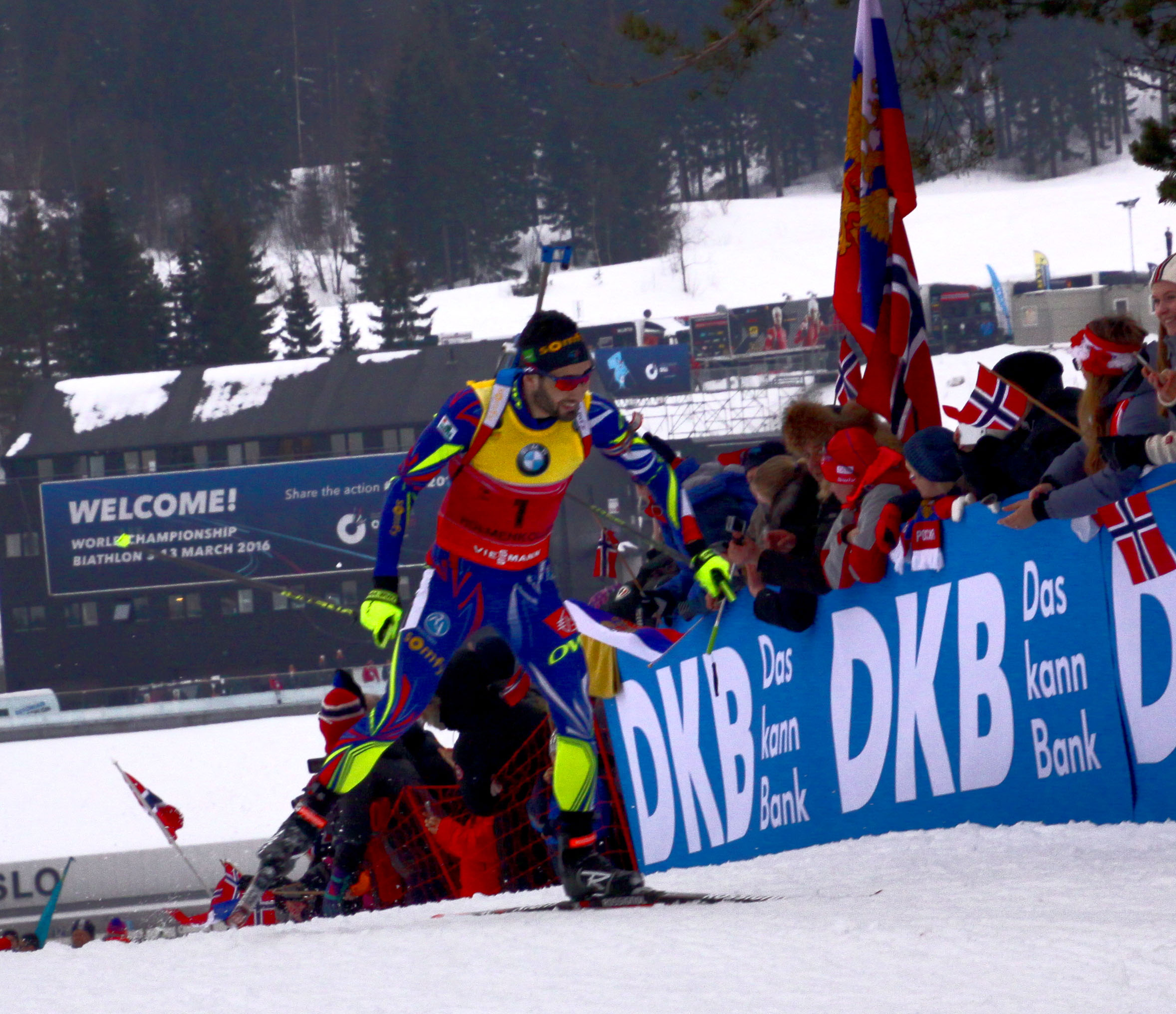 Oslo. Martin Fourcade aux championnats du monde de biathlon.